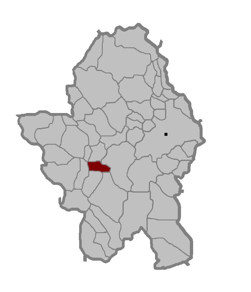 Насељено мјесто Зеленци